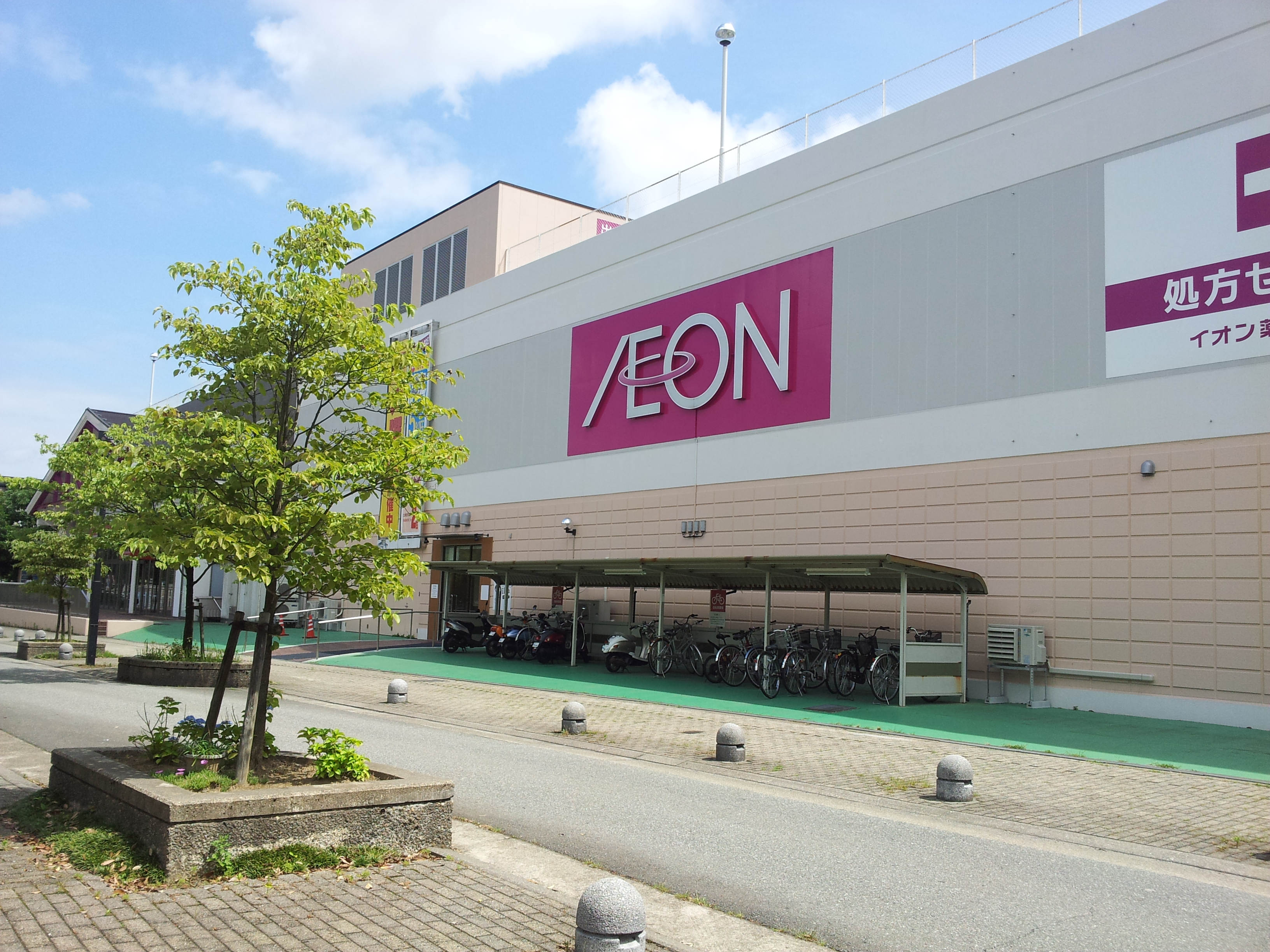 イオン杜の里店のマクドナルド側入口